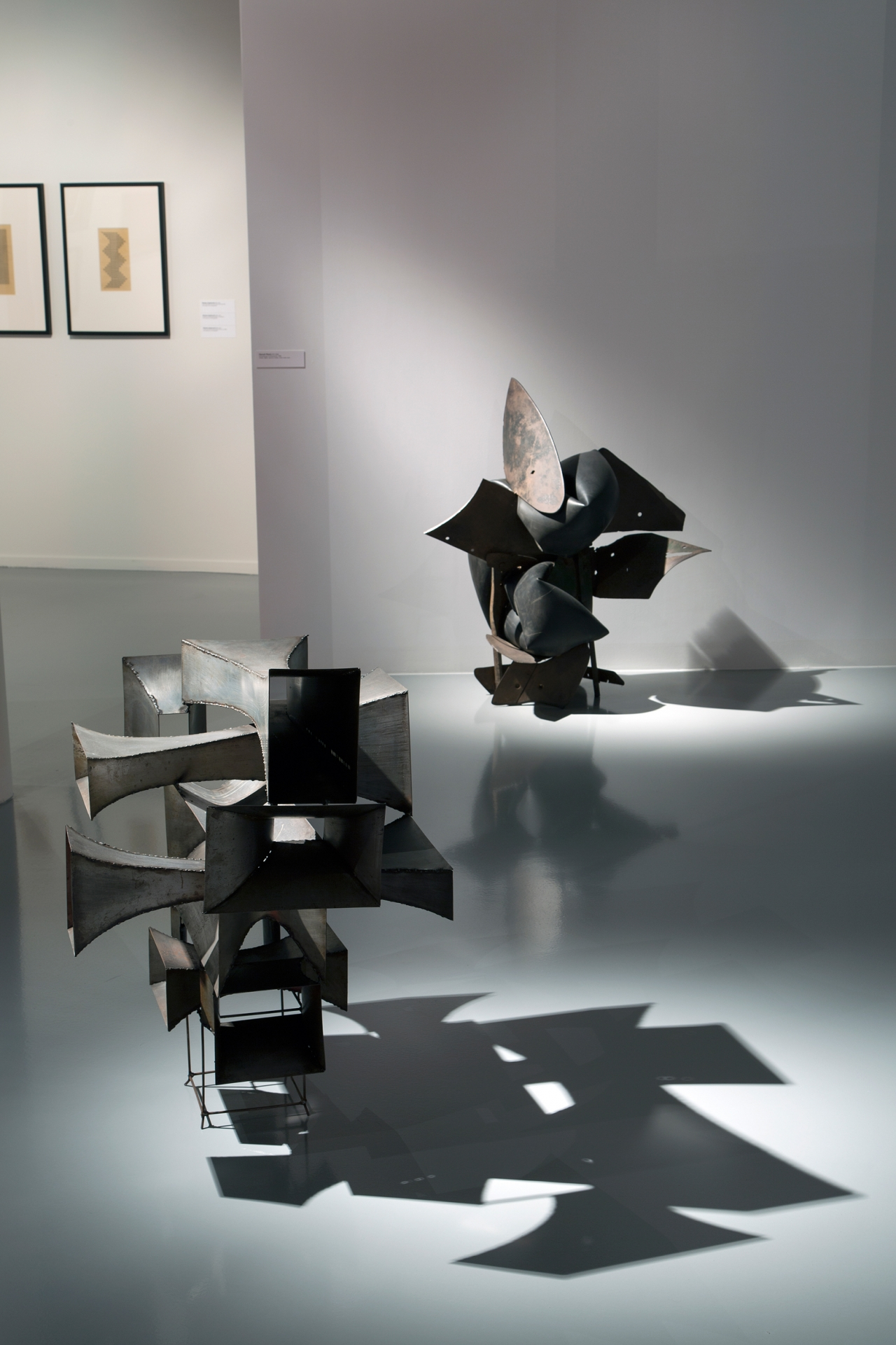 atlas - ekspozycja